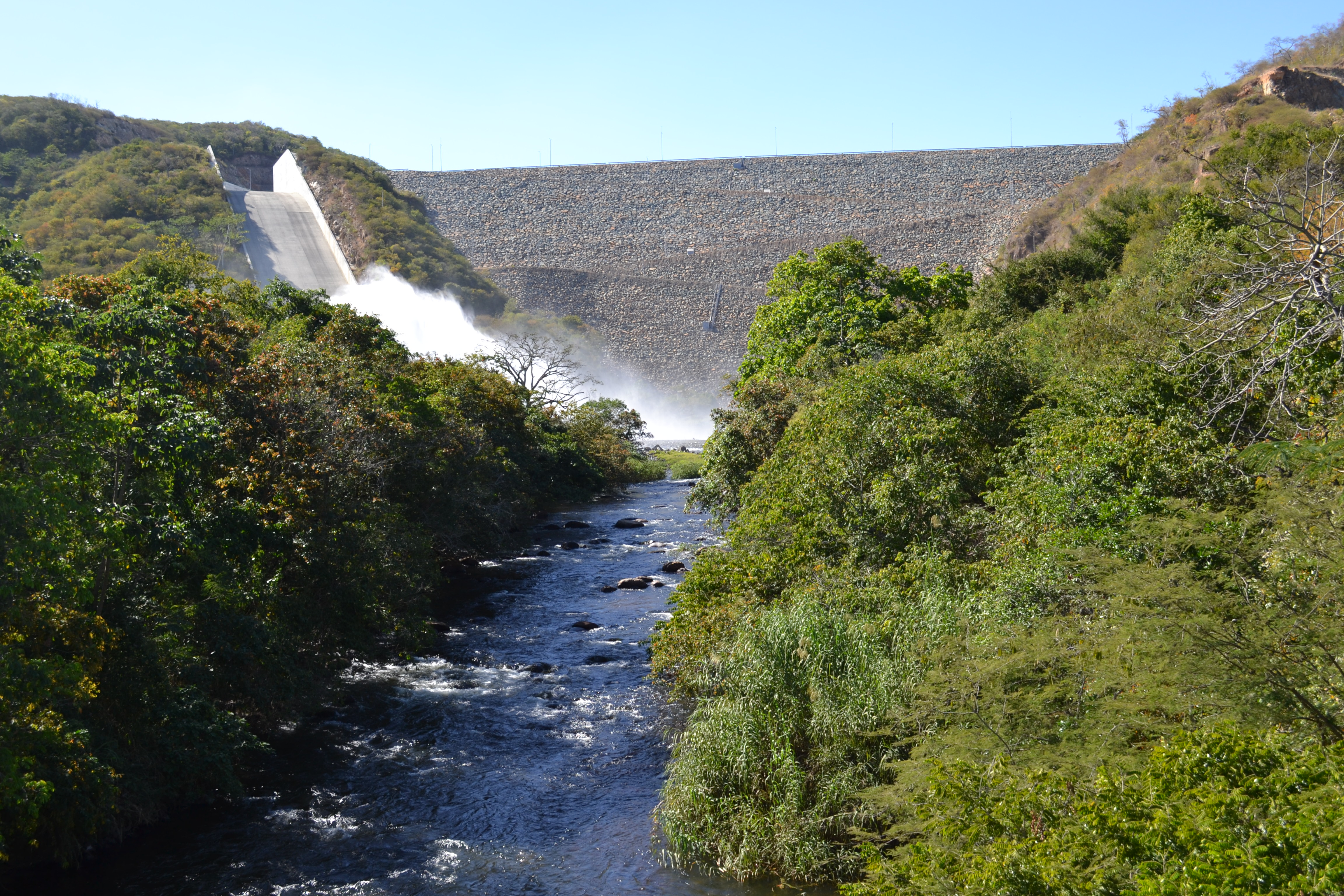 Enrocado y río - Presa El Cercado - Proyecto Río Ranchería ( La Guajira - Colombia)